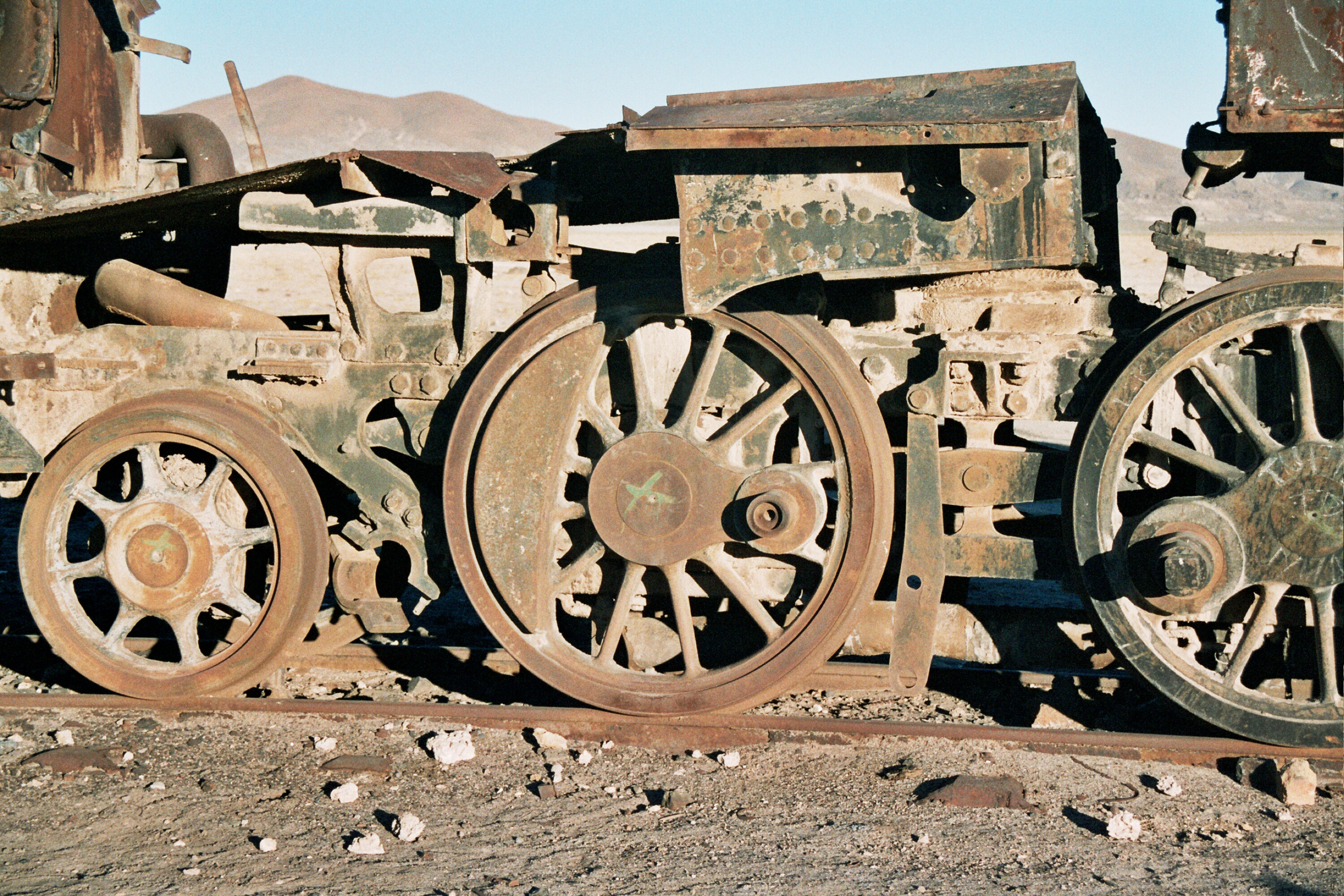 Lokomotivräder auf dem Zugfriedhof von Uyuni (Bolivien)